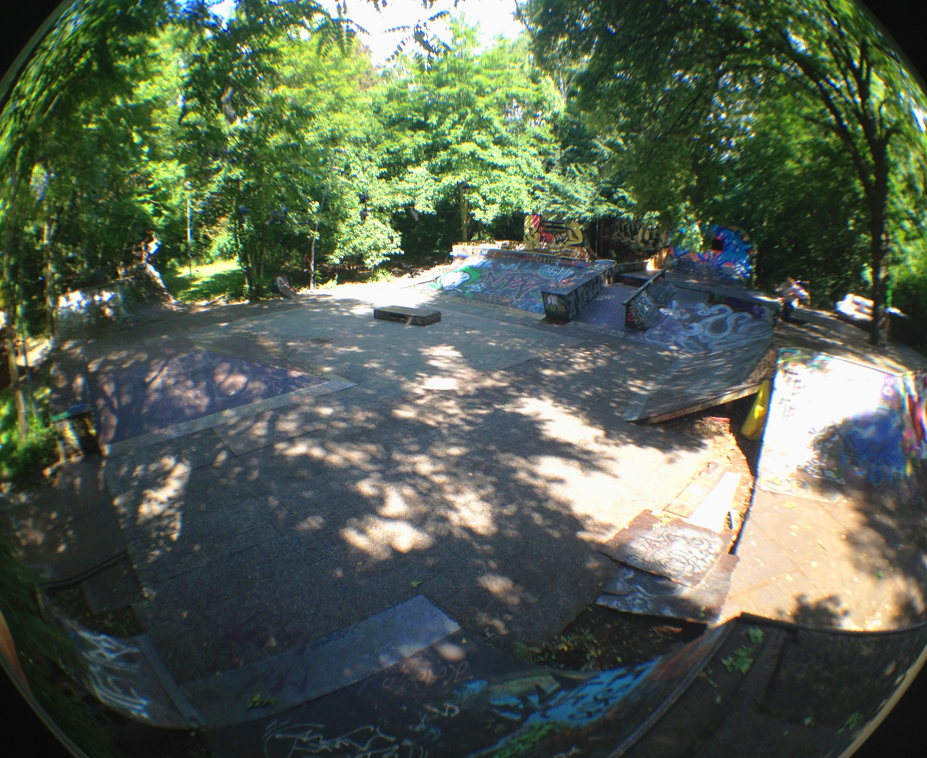 Conne Island Skatepark Leipzig im Jahr 2012